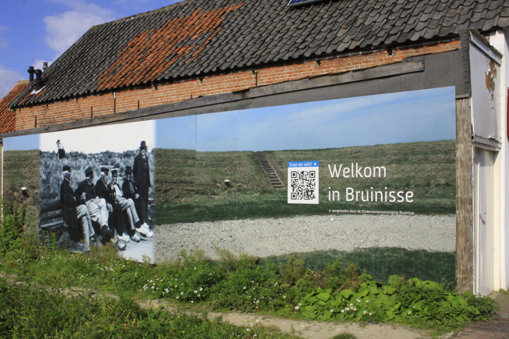 Een leuk welkom in Bruinisse op Schouwen-Duiveland. Zeeland.